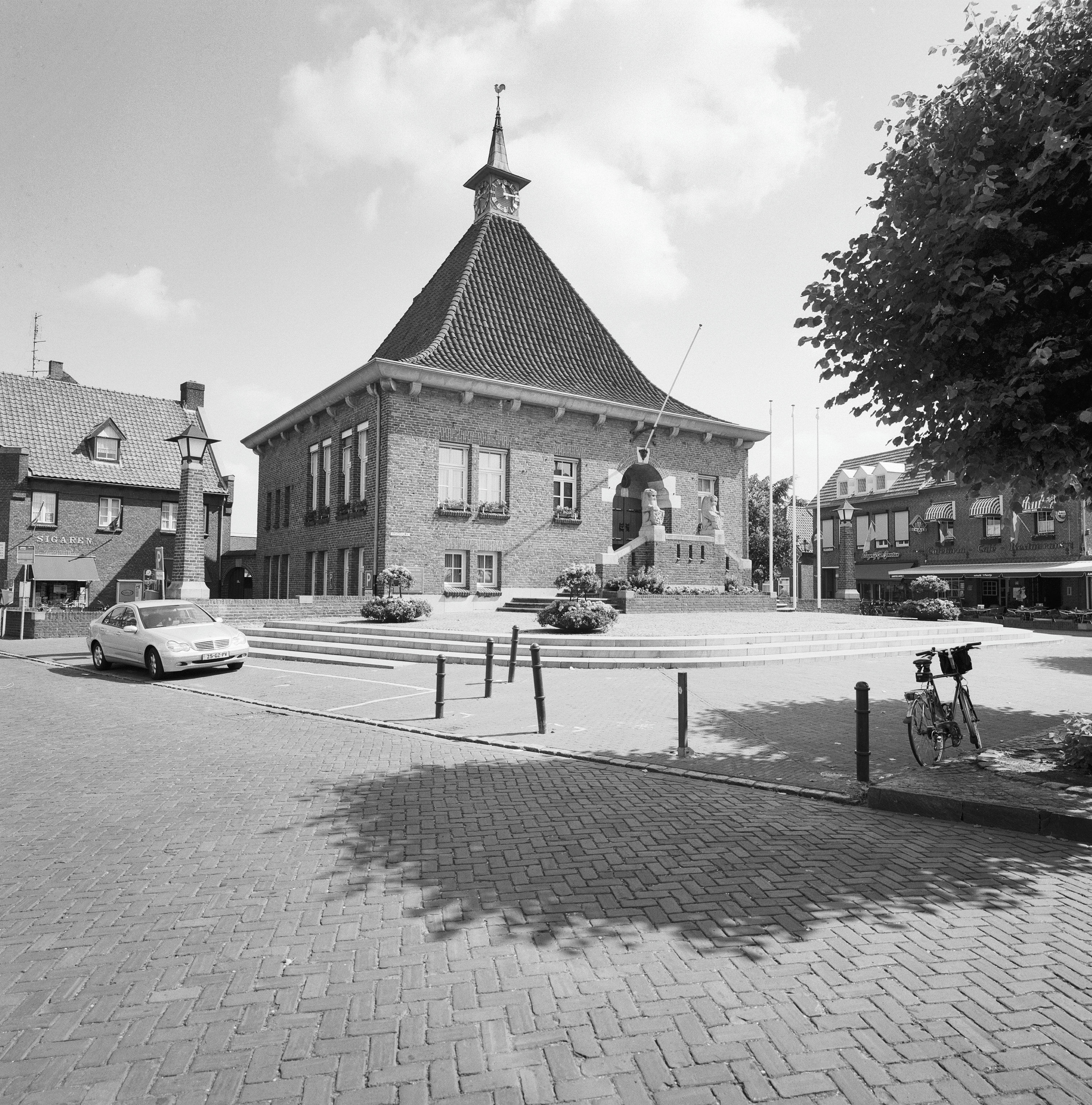 Raadhuis: Overzicht voorgevel met dakruiter en linker zijgevel (opmerking: Gefotografeerd voor Monumenten In Nederland Limburg)